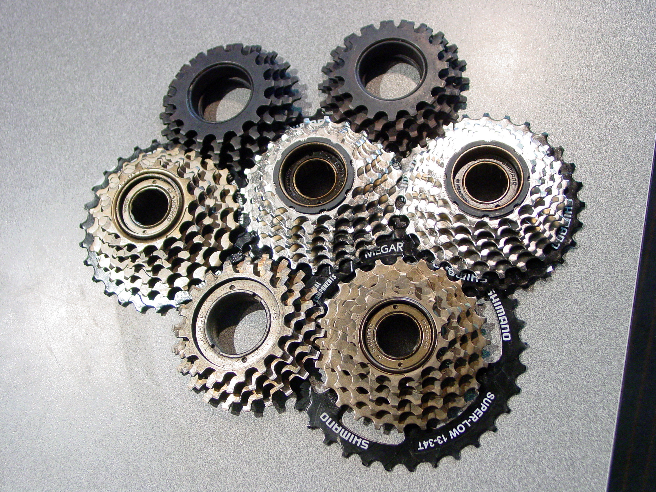 Fahrradtechnik